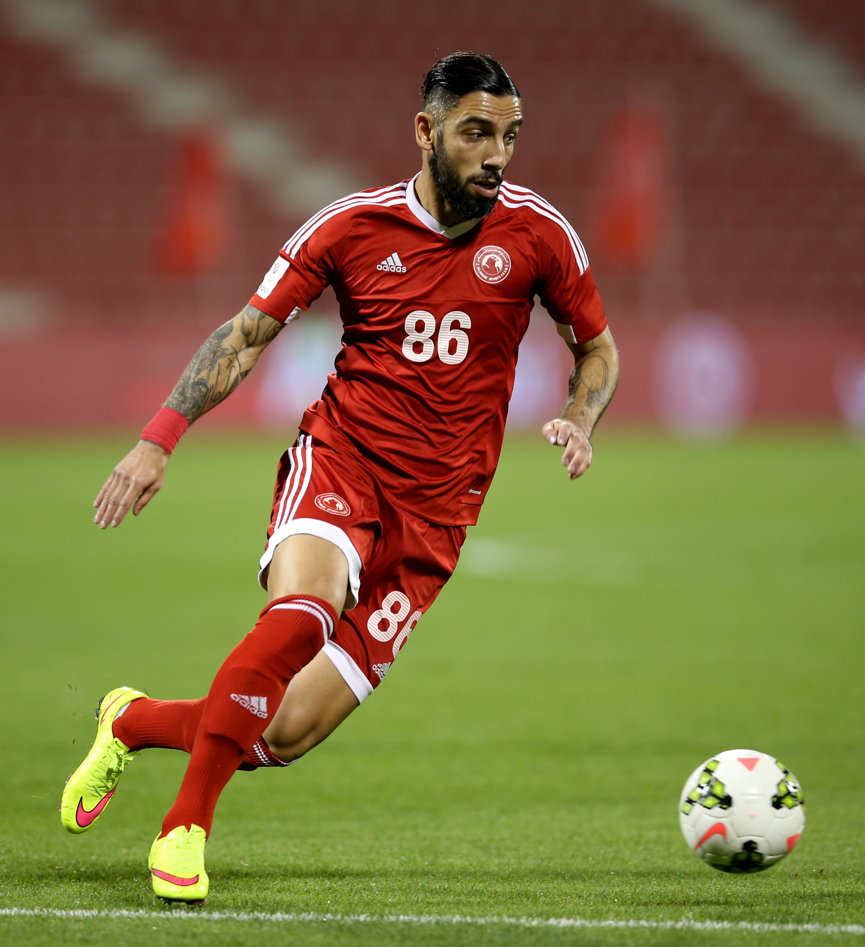 Ашкан Дежага